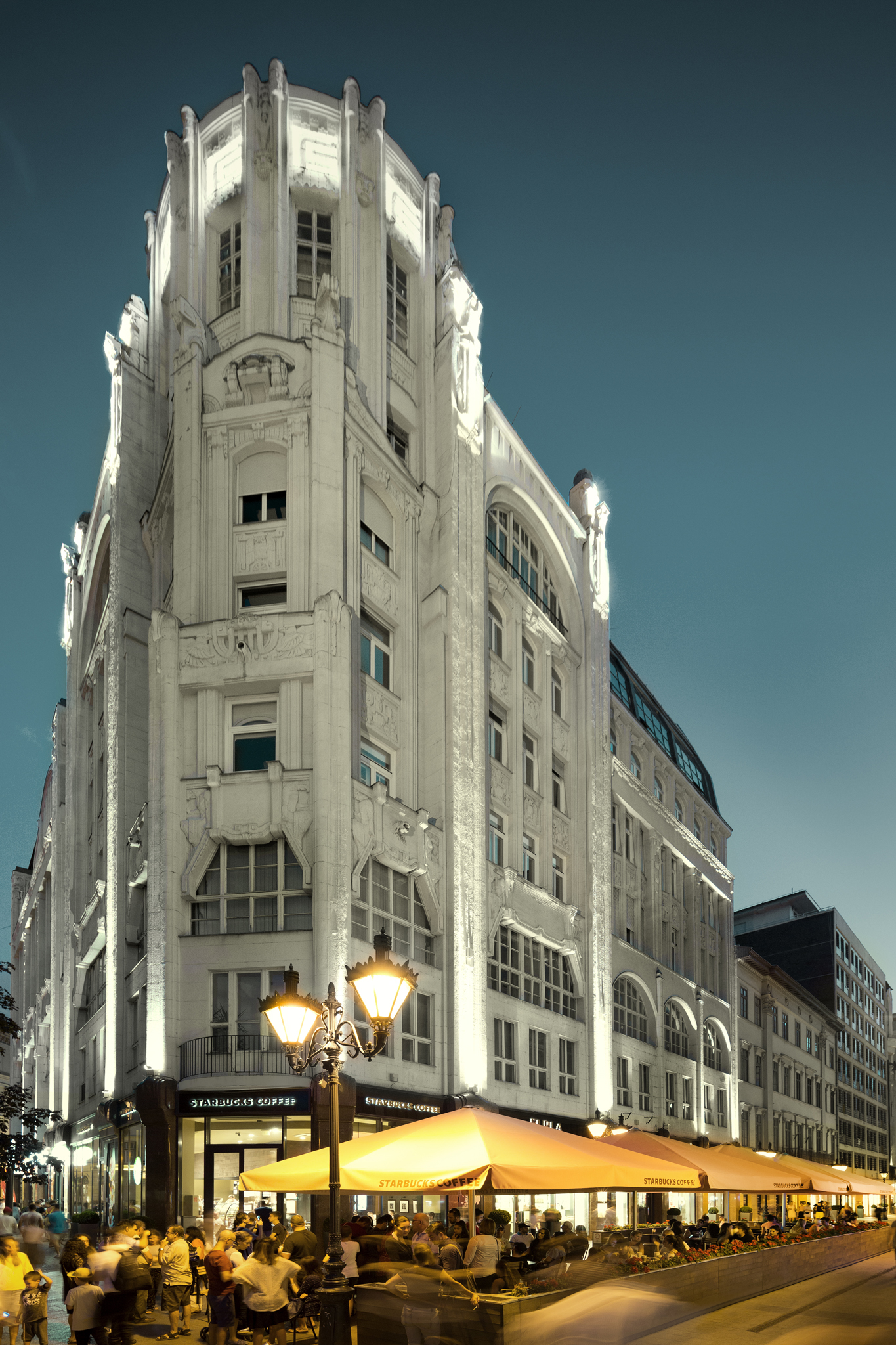 Az ötemeletes saroképületet – melyet egykor Deák Ferenc utca háromként tartottak számon – a mai napig a német jugendstil homlokzatok mestereinek számító révész & Kollár építészpáros legjobb munkájaként tartják számon. A Modern és Breitner Áruház, ahogy egykor hívták, a nyugat-európai art nouveau hatását mutatja a magyar építészetben.